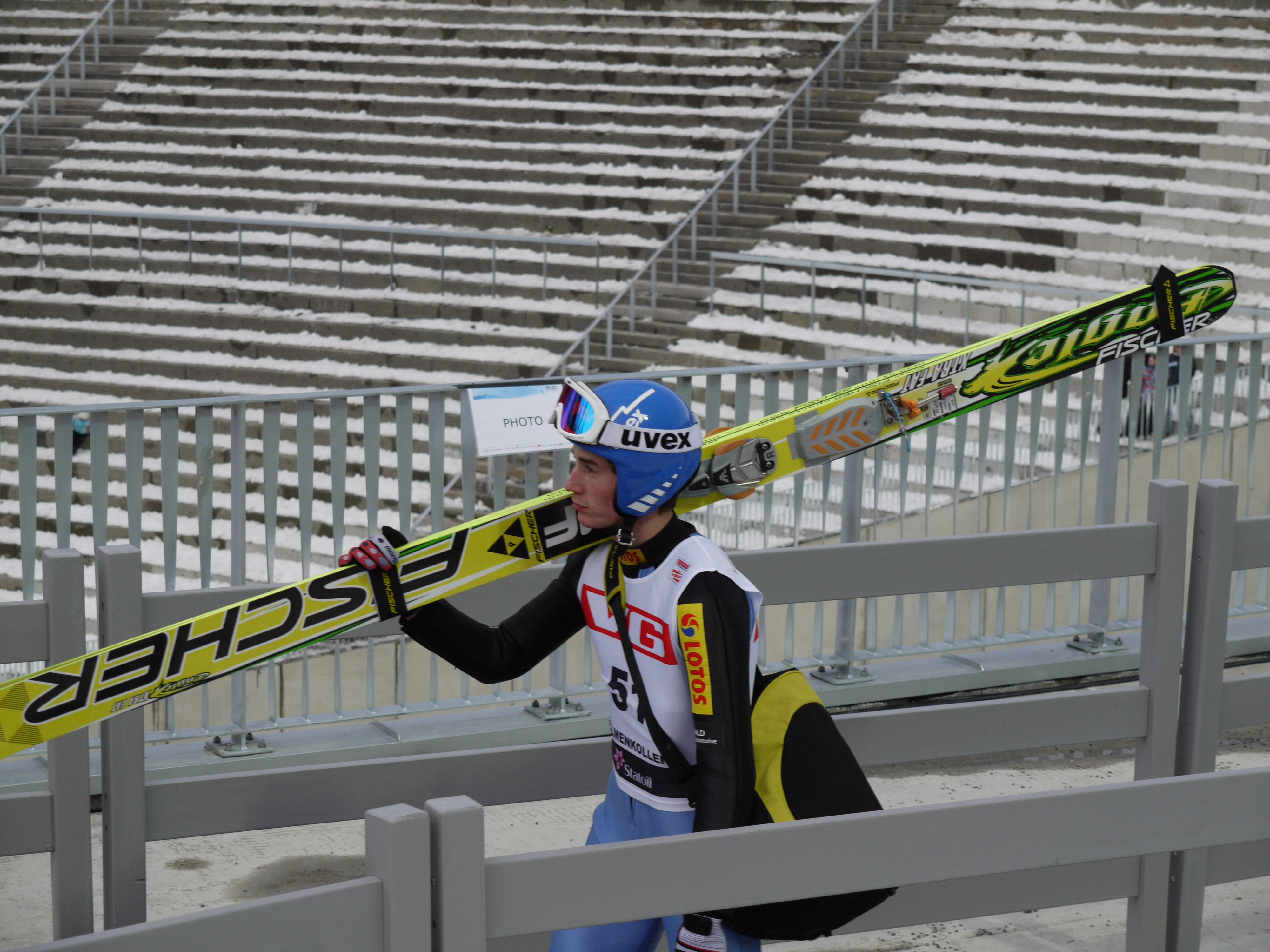 Kamil Stoch on the 2010 ski jumping World Cup event in Holmenkollen